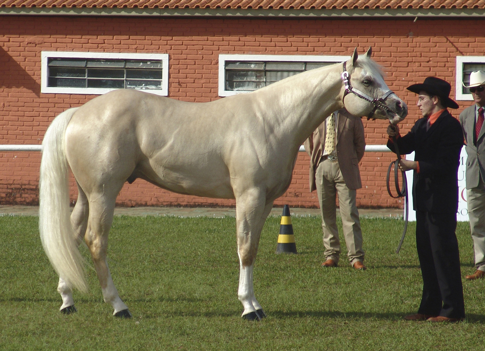 Cavalo da raça Quarto de milha (Quarter Horse) em exposição na EMAPA, Avaré- São Paulo, Brasil